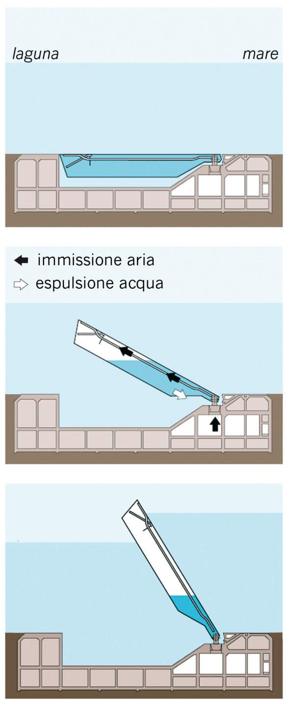 Movimento delle paratoie. In condizioni normali di marea, le paratoie sono completamente invisibili e giacciono sui fondali delle bocche di porto, piene d’acqua; quando è prevista un’alta marea, vengono svuotate dall’acqua con l’immissione di aria compressa e si sollevano, fino ad emergere, creando una barriera continua che divide temporanemante il mare dalla laguna